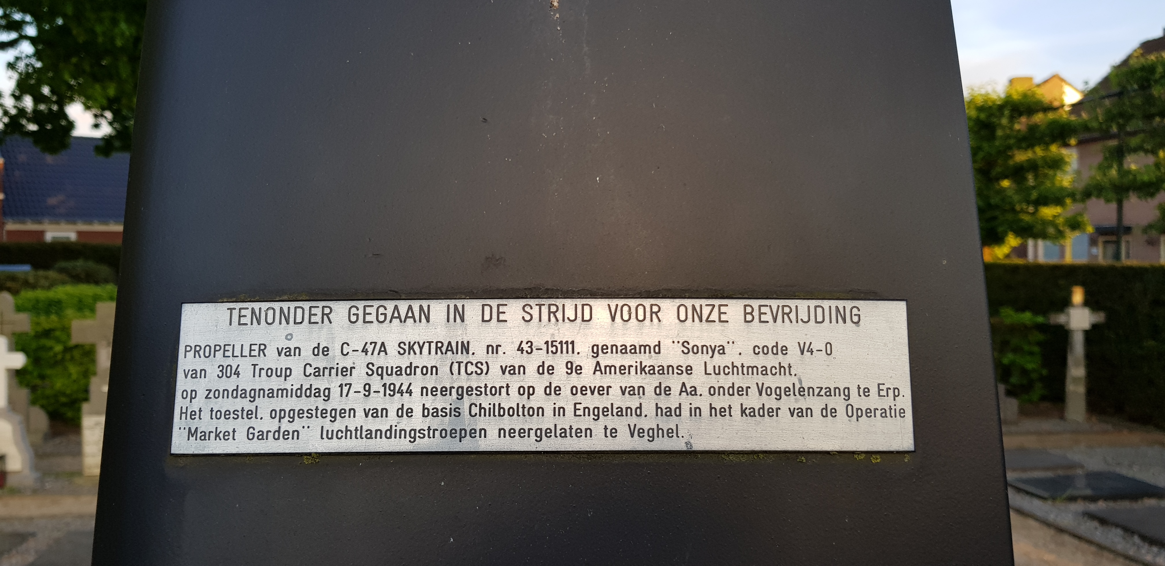 Metalen plaat met tekst op de propeller van de C-47A Skytrain. Genomen op het kerkhof in Erp op 2 mei 2019.